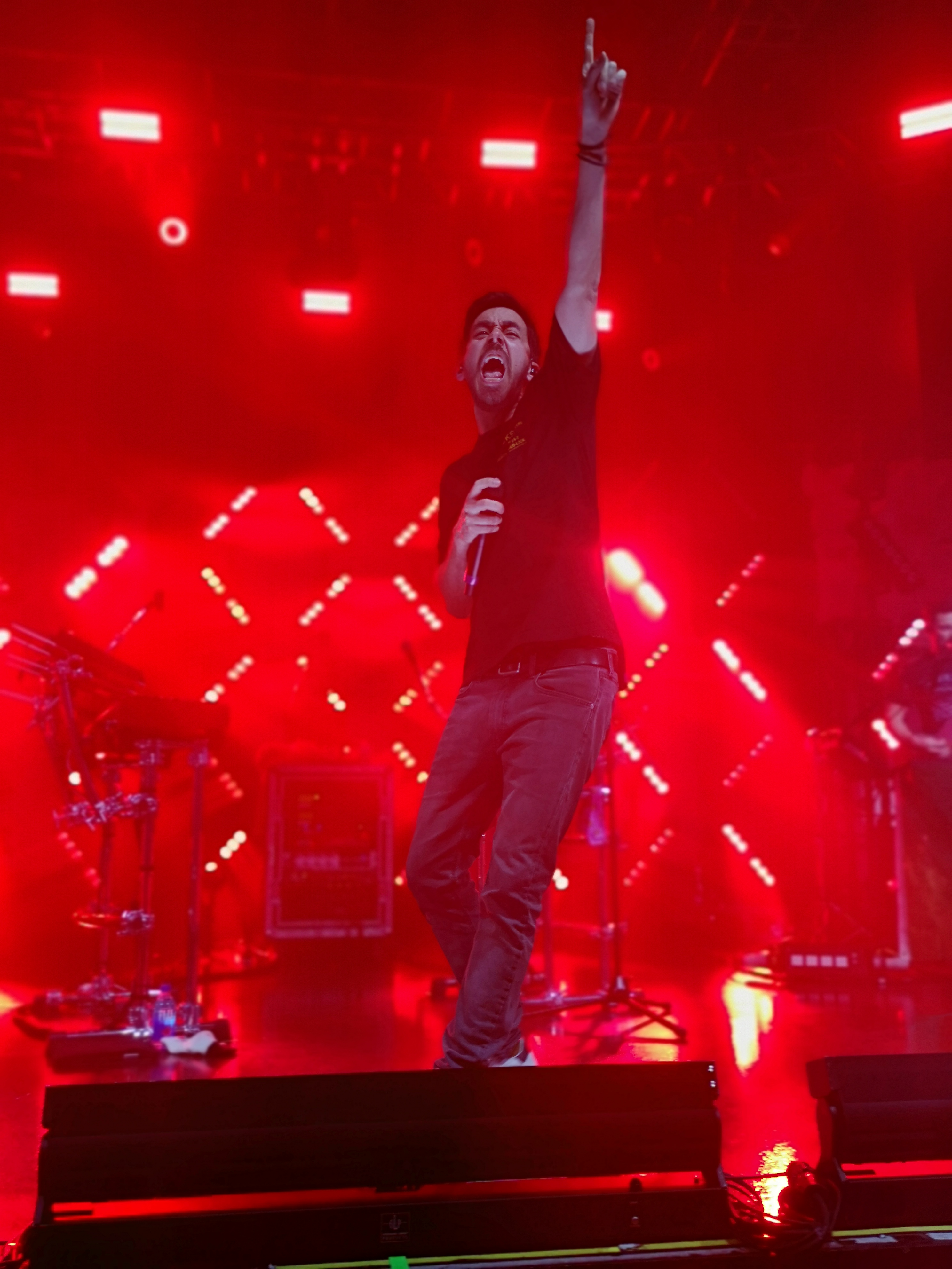 Mike Shinoda in concerto al Fabrique di Milano il 14 marzo 2019